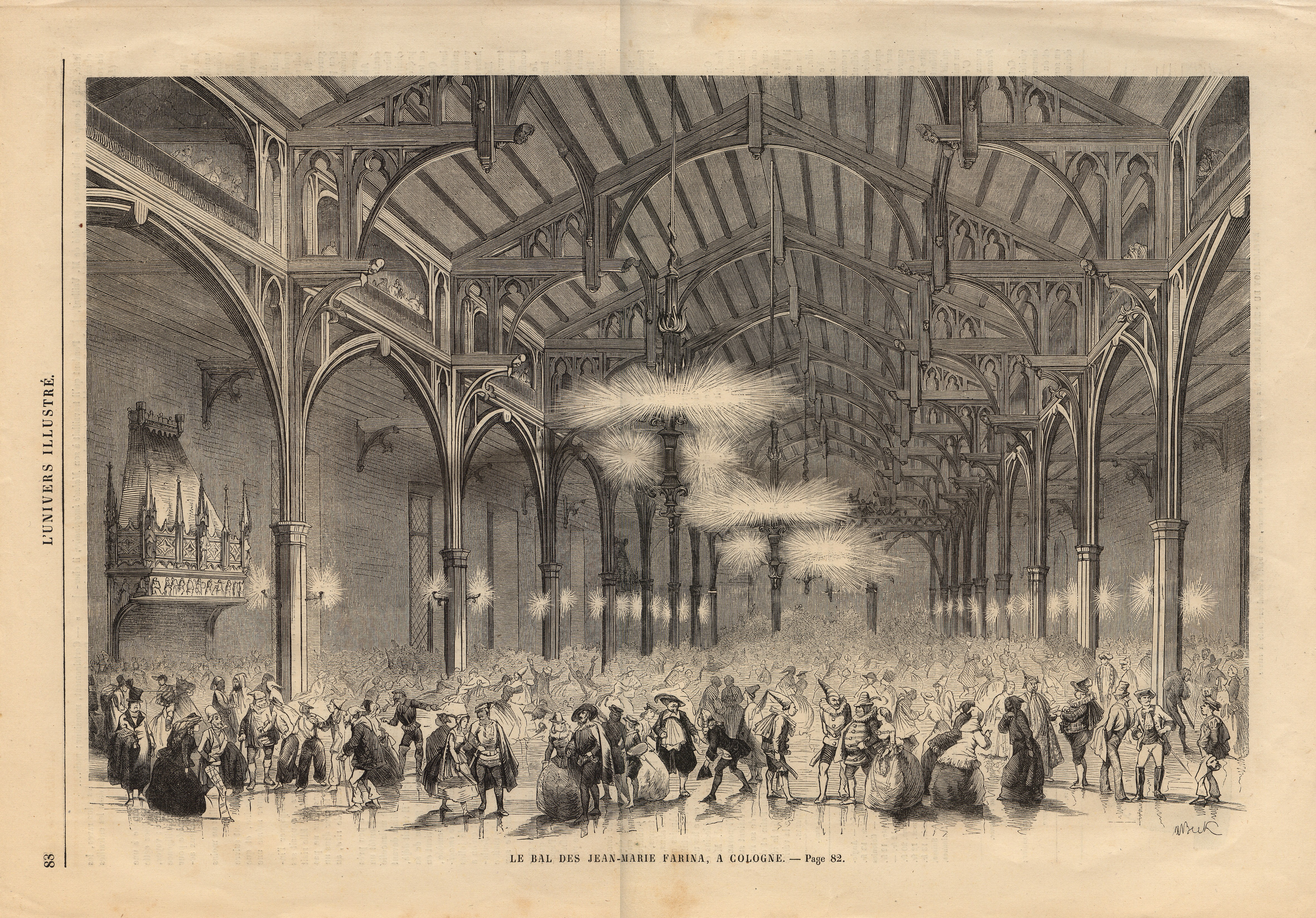 Le bal de Jean Marie Farina a Cologne 1861